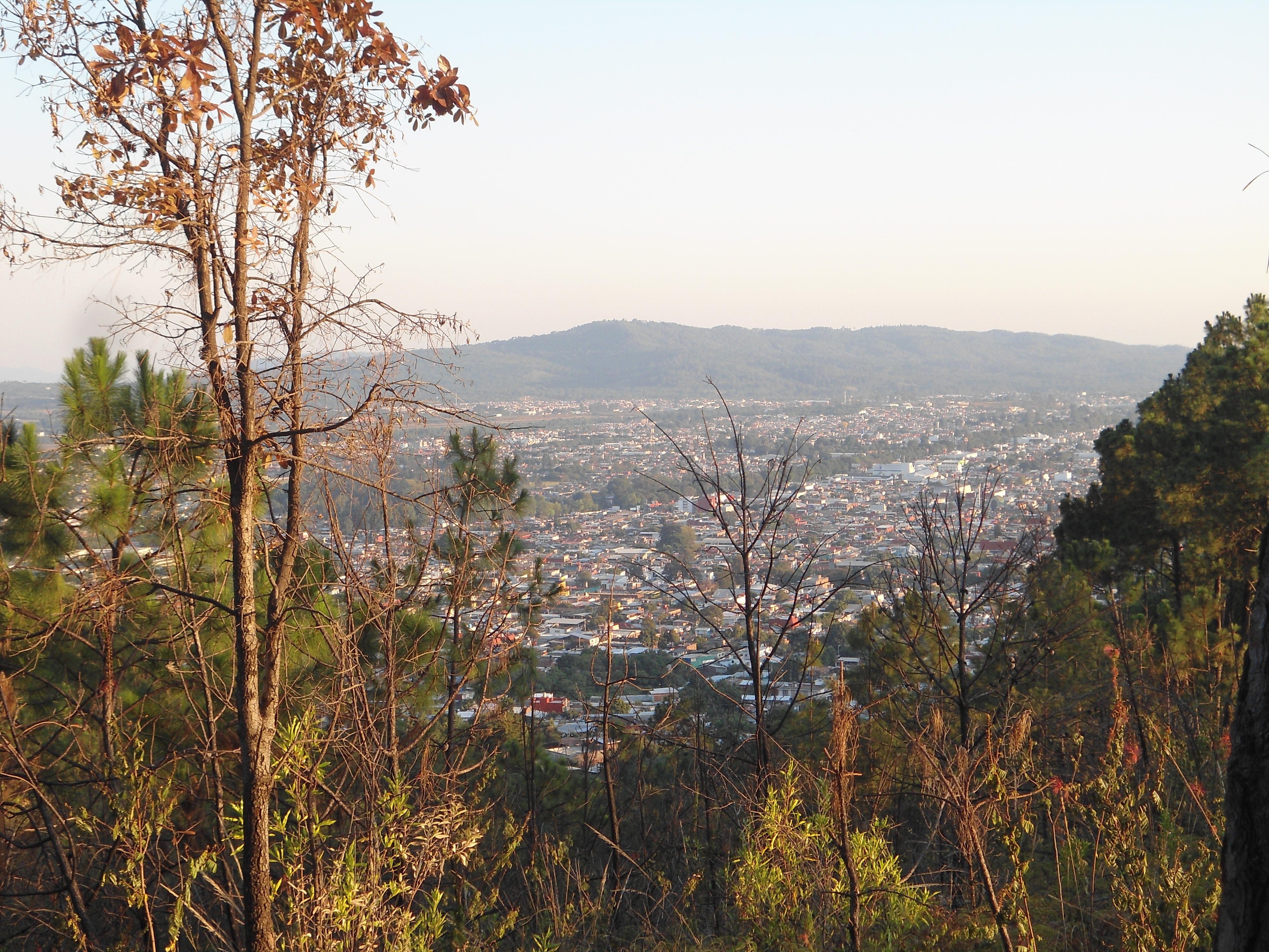 Vista hacia la ciudad Uruapan, desde el Cerro de la Charanda en el Municipo de Uruapan, Michoacán.